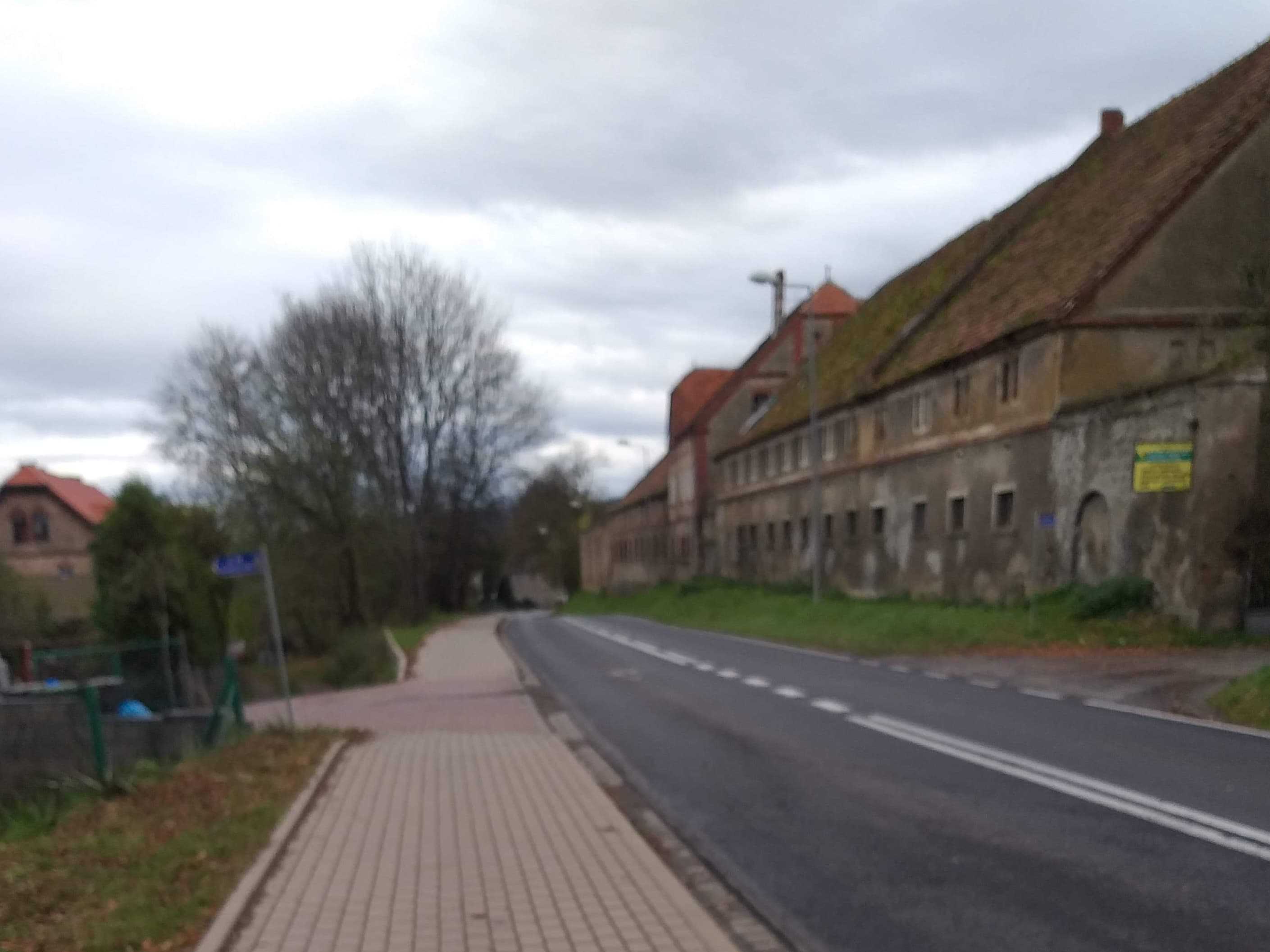 Środkowa część wsi (po prawej stronie budynki dawnego folwarku pałacowego i PGR)